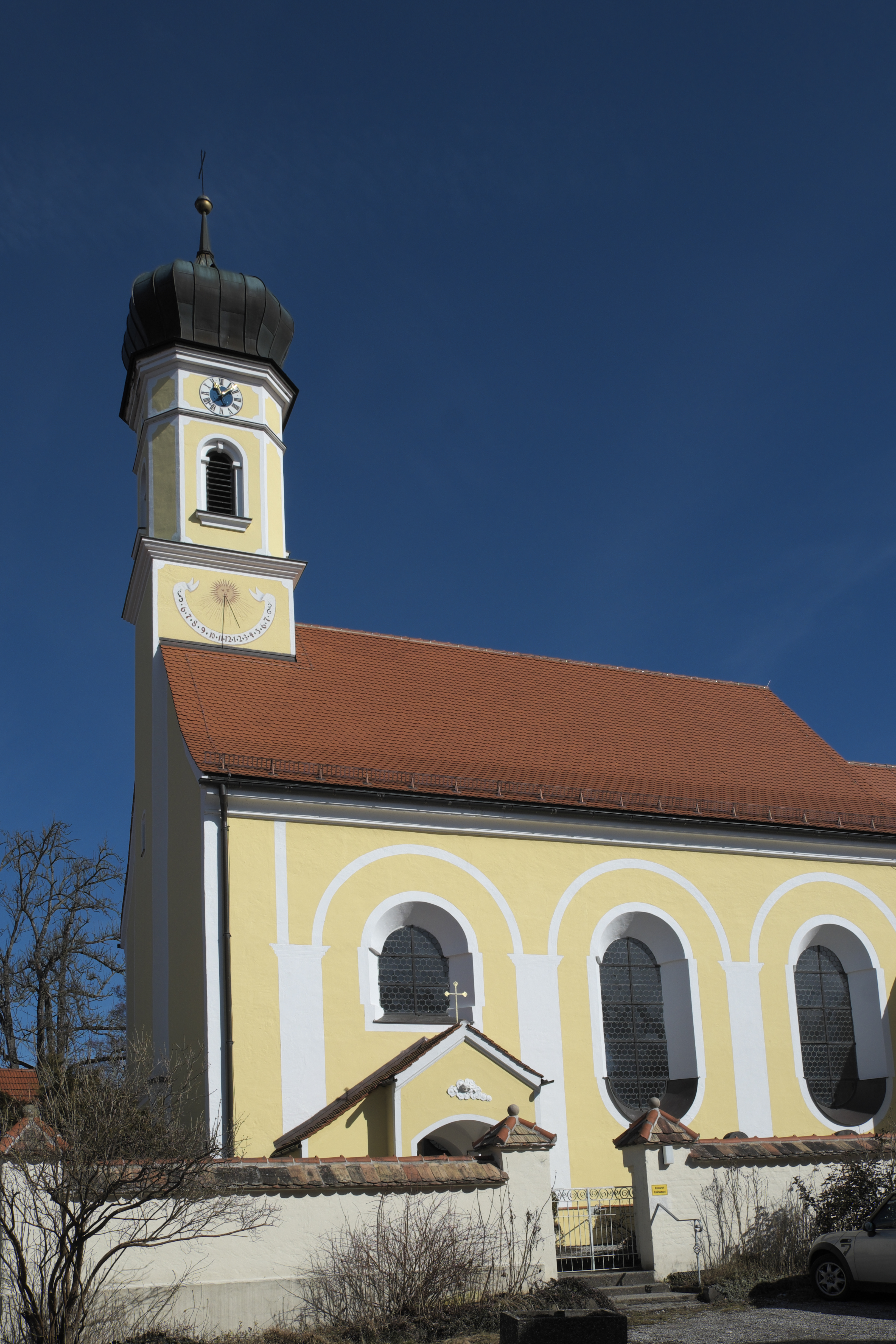 Katholische Filialkirche St. Maria, ehemalige Wallfahrtskirche, in St. Heinrich, einem Ortsteil von Münsing im Landkreis Bad Tölz-Wolfratshausen (Bayern/Deutschland)